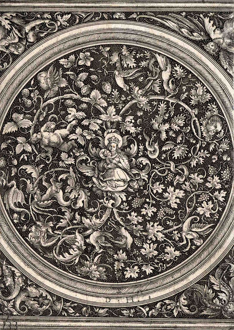 Hopfer, Daniel (ca 1470-1536): Mutter Gottes mit dem Jesusknaben in runder Ornamentfüllung mit Wein- und Erdbeerranken, Fabelwesen, in den Eckzwickeln Hörner blasende Putten und Grotesken. Eisenradierung. 19,3 x 13,8 cm. (Plattenränder meist, teils mit Einfassungslinienverlust, beschnitten; ein kleiner Eckabriss unten rechts ergänzt). Hollstein 40, ii/ii, with Funck number 133. Zustand (mit der Funck-Nr. 133). Seltenes Blatt in gutem Druck. Note: the circle is truncated in the original plate.